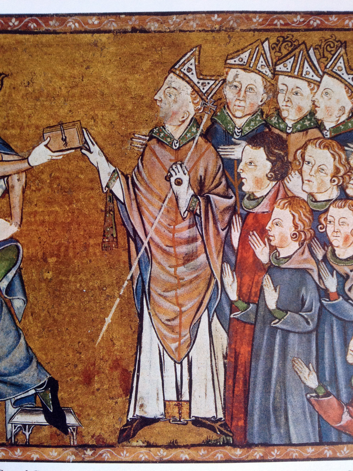 Extrait d'une miniature du XIVe siècle représentant Gilles Aycelin de Montaigu, archevêque de Rouen, donnant le Grand coutumier de Normandie à Louis X en 1315.